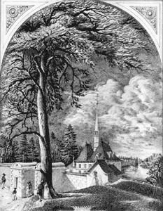 Приоратский дворец (Гатчина)